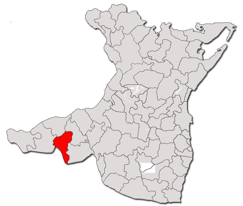 Băneasa in Constanţa County